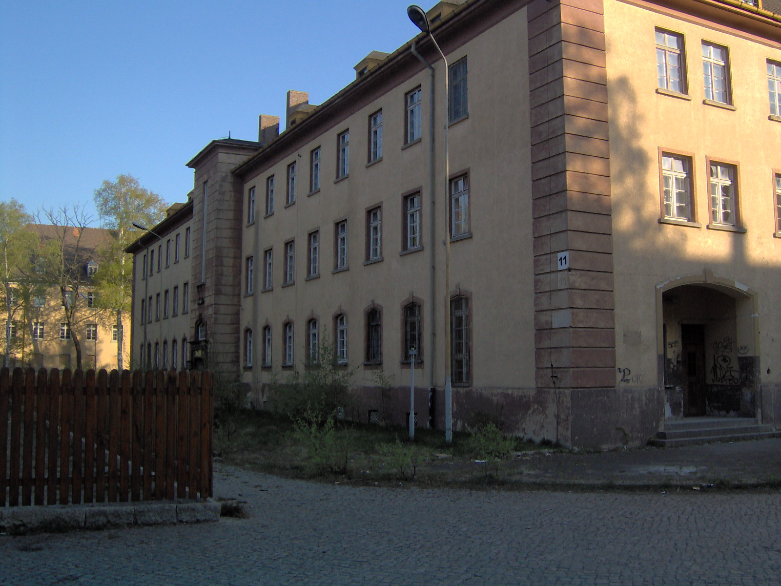 Byłe koszary w Żarach, sztab 11pa